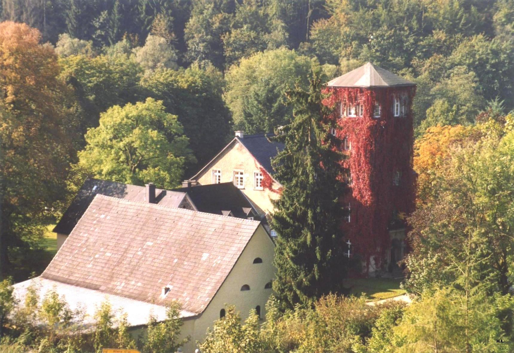 Haus Bamenohl, Ansicht vom Krähenberg